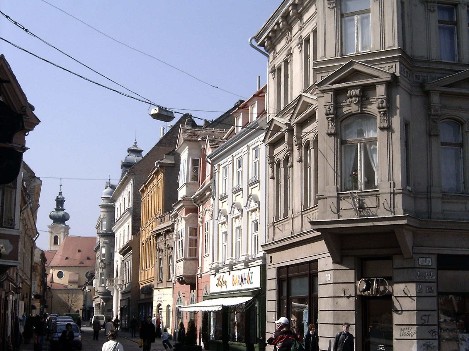 A győri Kazinczy utca északi házsora